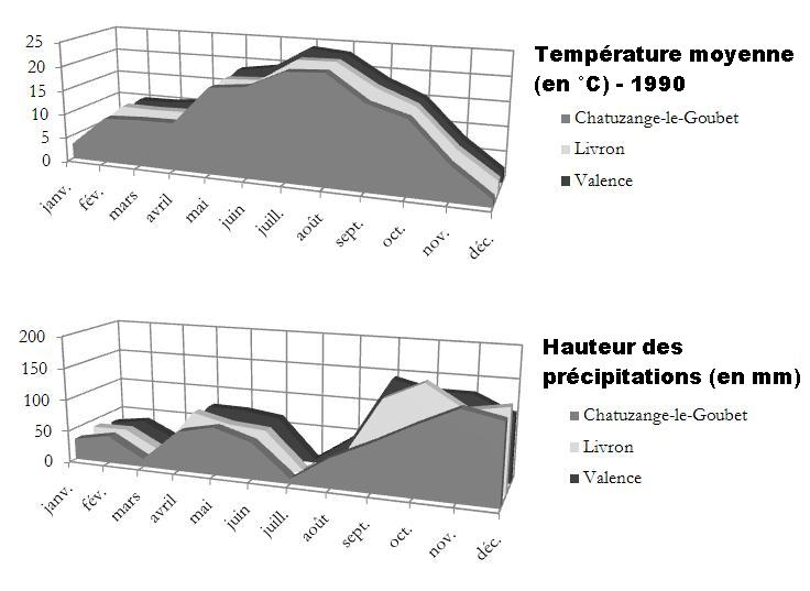 Courbes de température et précipitation dans le Valentinois en 1990 : Chatuzange-le-Goubet, Livron, Valence